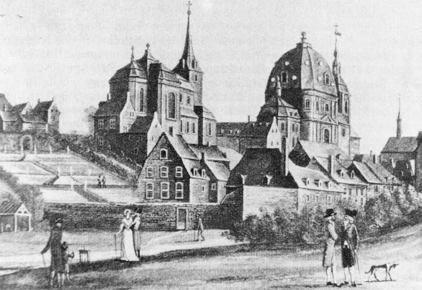 Abtei Burtscheid um 1790